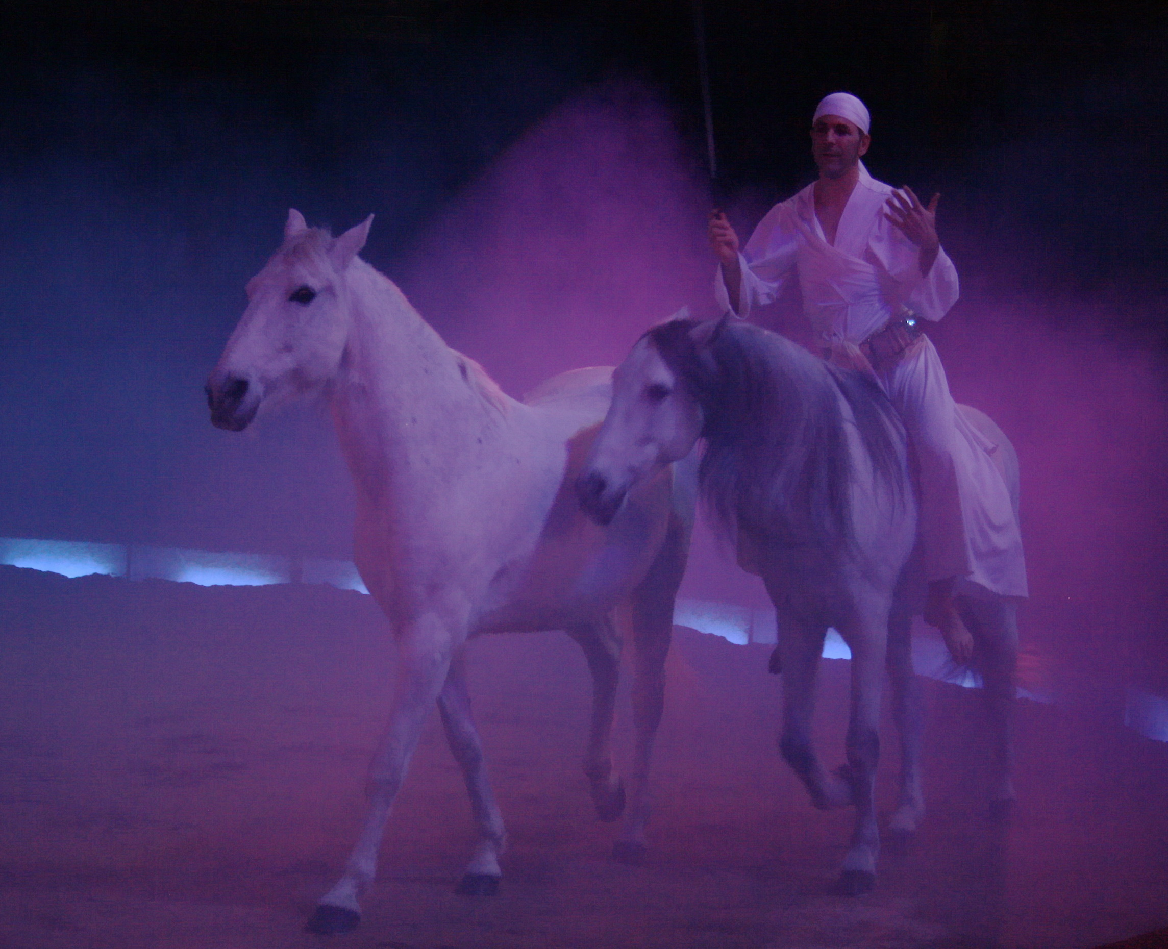 FRATELLI GIONA Pferdedressur in einer Zirkusvorstellung